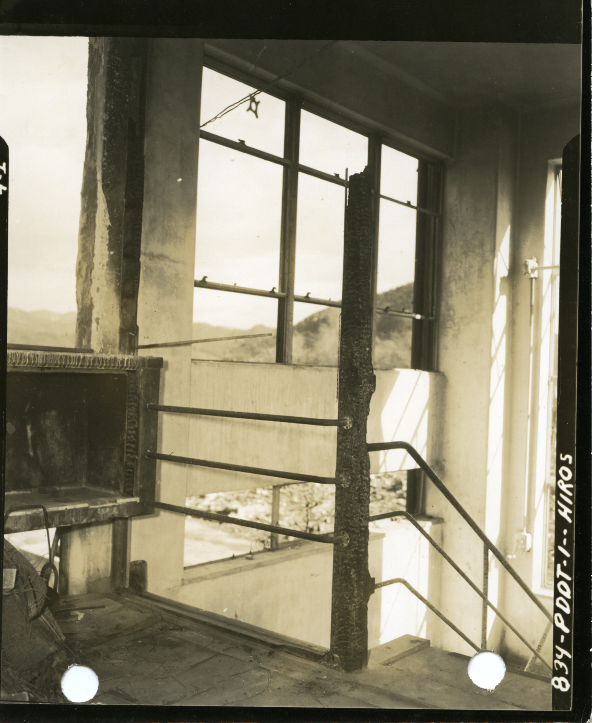 旧広島逓信病院の南端階段付近